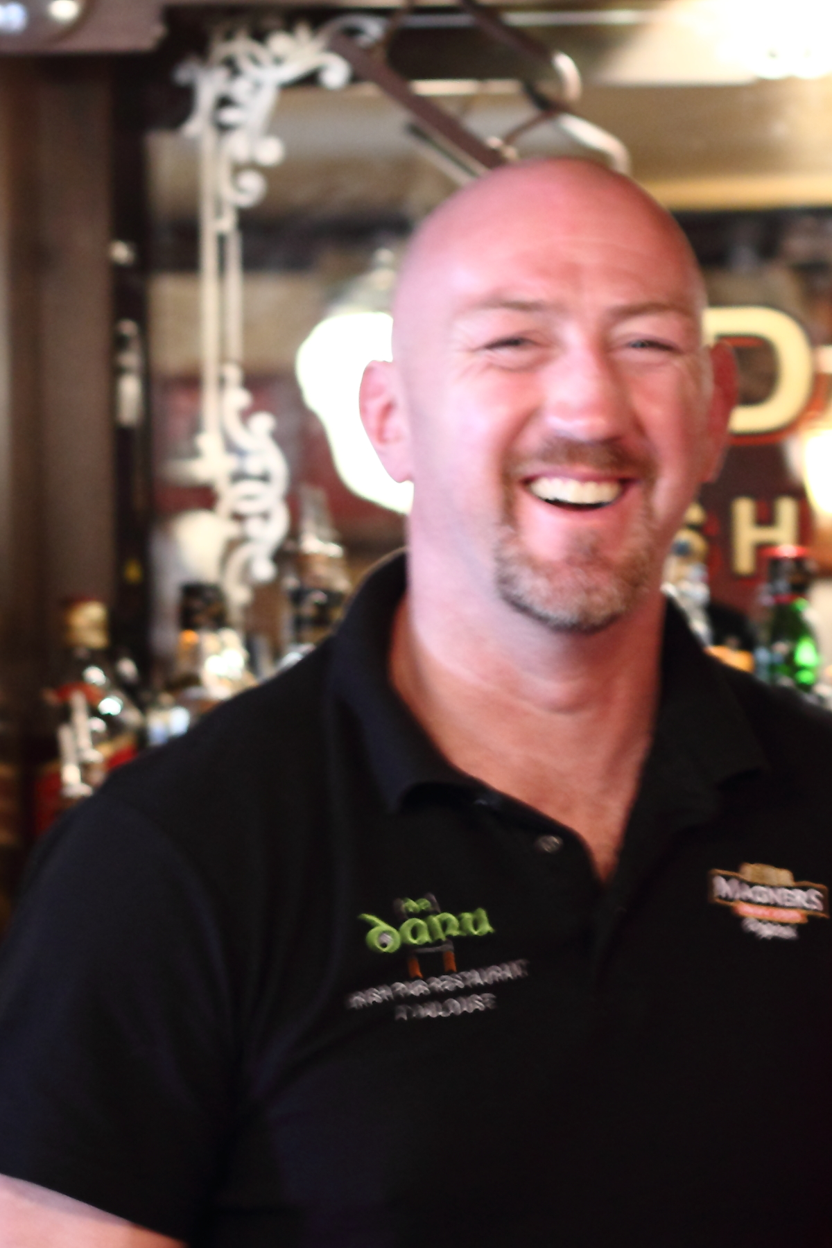 Trevor Brenan au De Danu